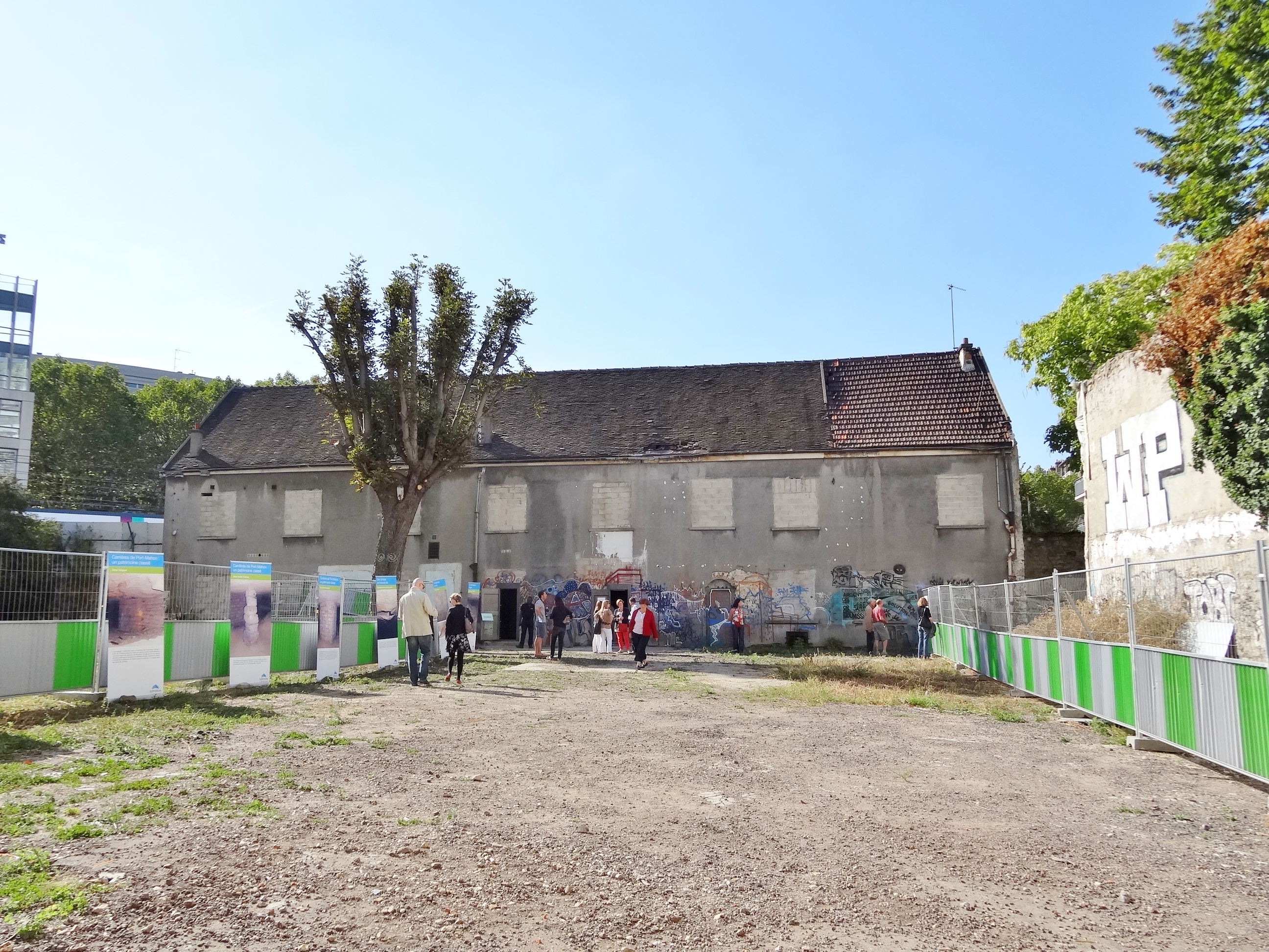 Paris 14e arrondissement - 26 rue de la Tombe-Issoire - Ancienne ferme de Montsouris - façade de la grange en fond de cour. Journées du patrimoine 15 et 16 septembre 2012